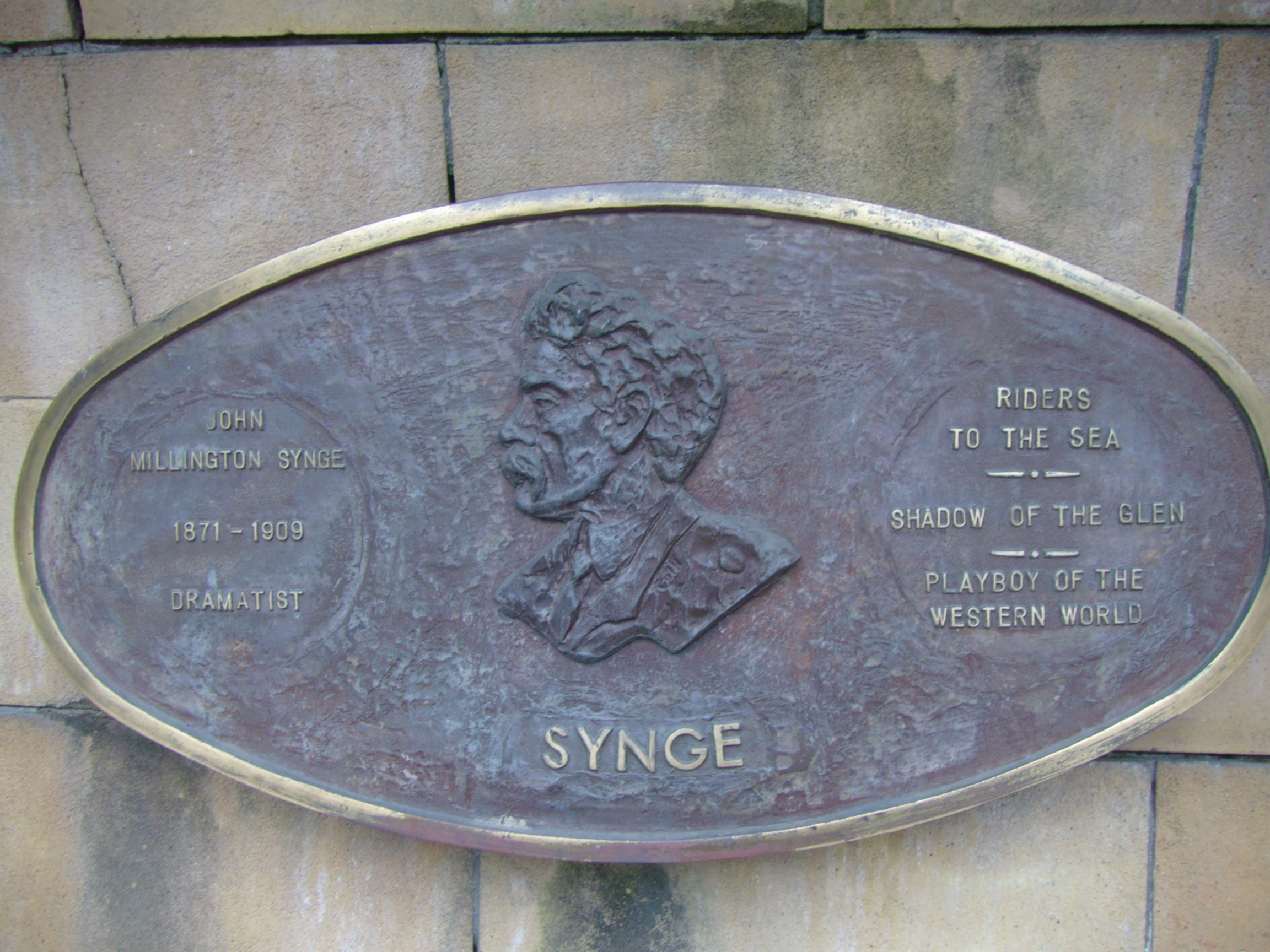 John Millington Synge (1871–1909), irischer Dichter; Plakette im Saint Patrick's Park, Dublin, dort angebracht anlässlich der Dublin Millennium 988–1988 Literary Parade